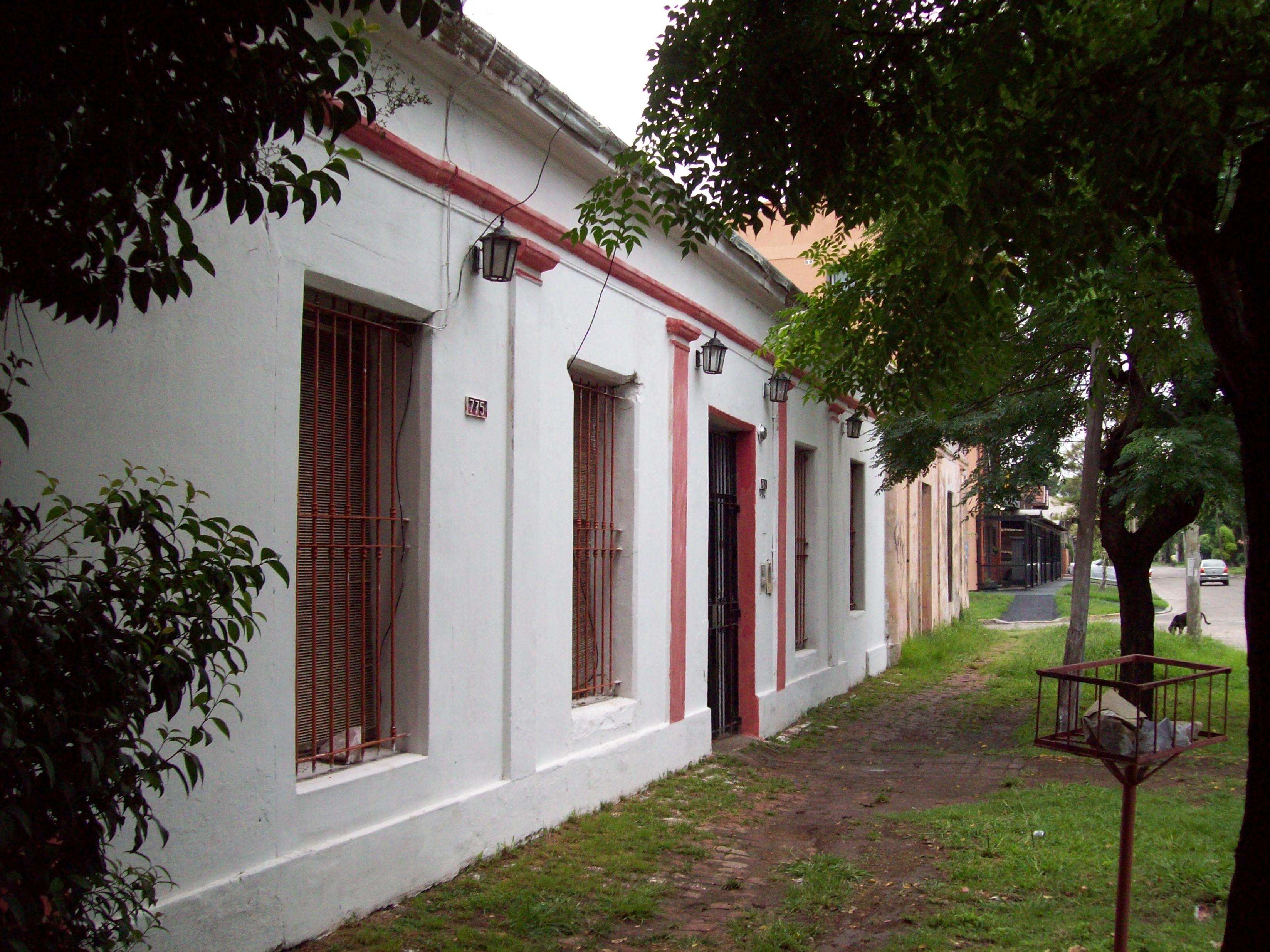 Casa histórica de Florencio Varela, donde funcionó el primer almacén.